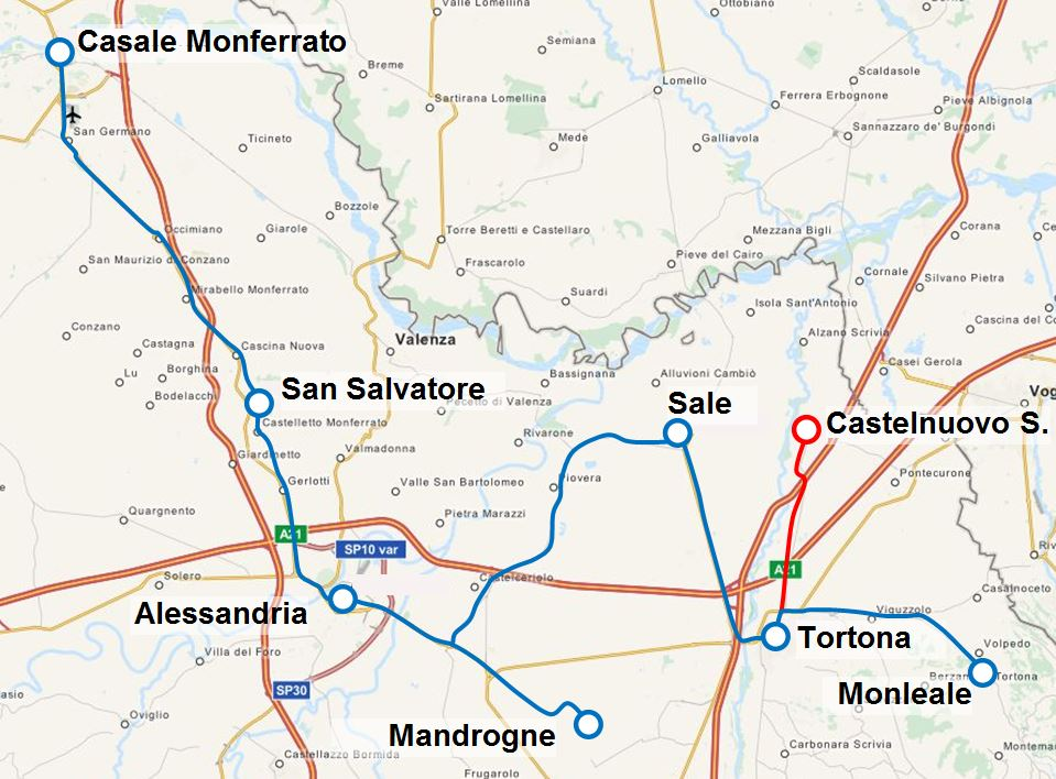 Rete della Società Anonima delle Tramvie a Vapore della Provincia di Alessandria